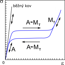 graf elasticke deformace u SMA